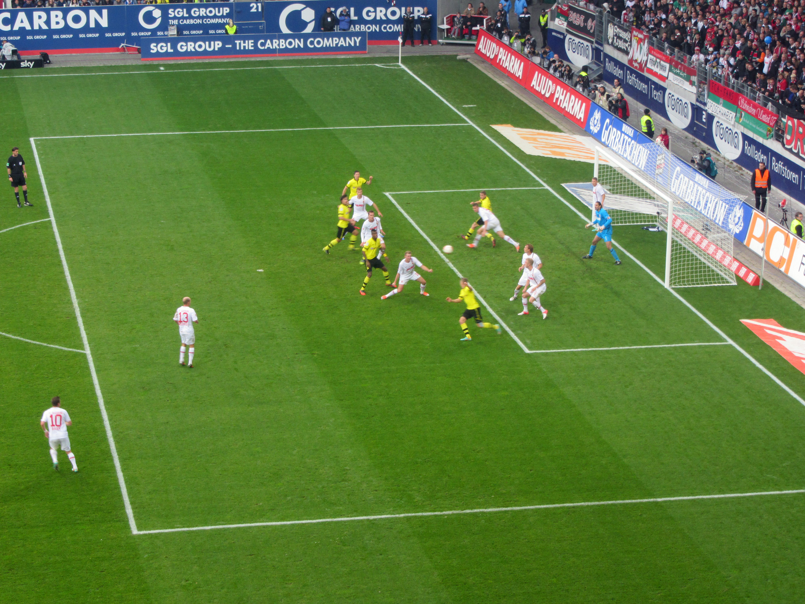 Borussia Dortmund against Augsburg in November 2012.